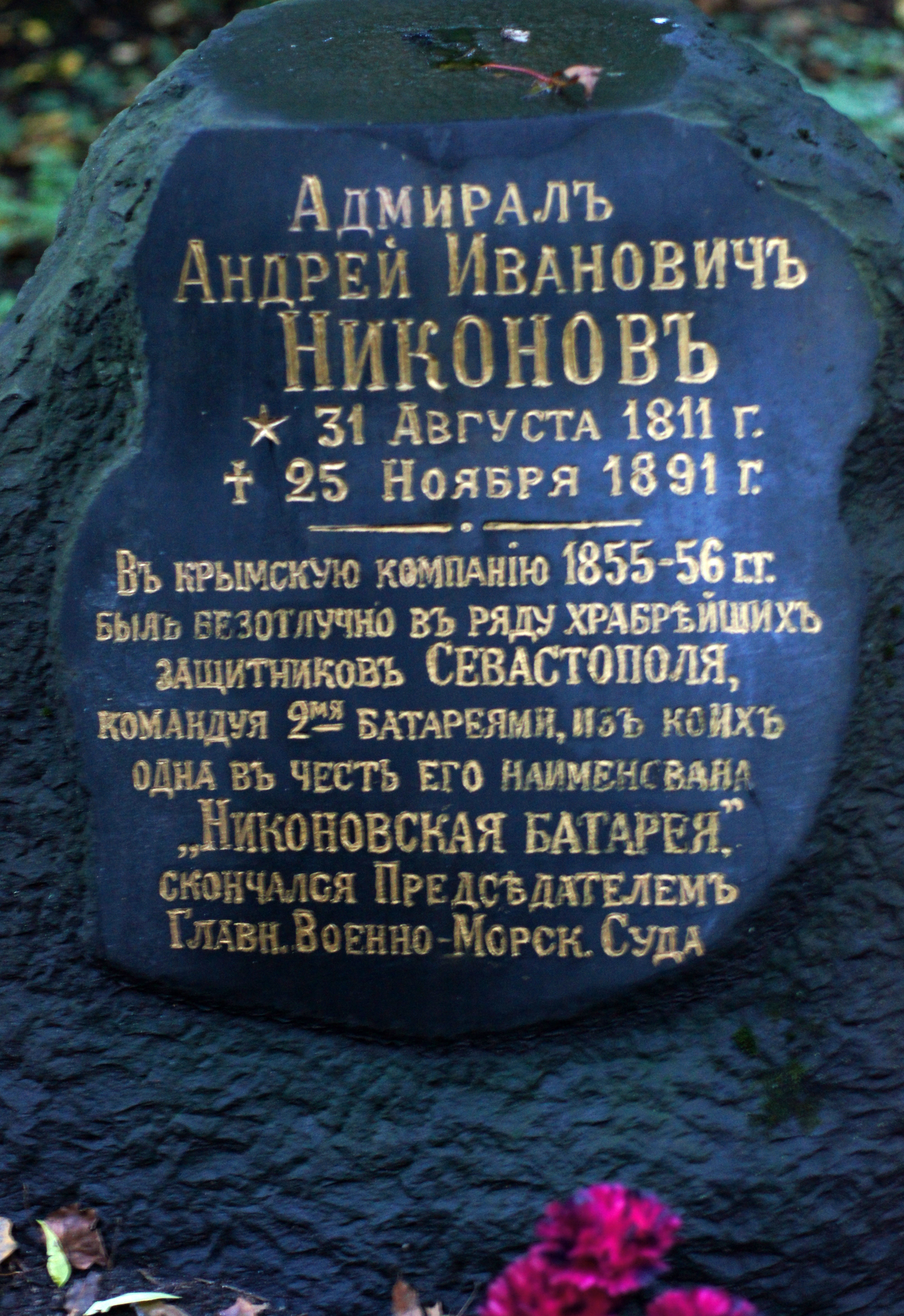 Эпитафия на могиле адмирала Андрея Ивановича Никонова